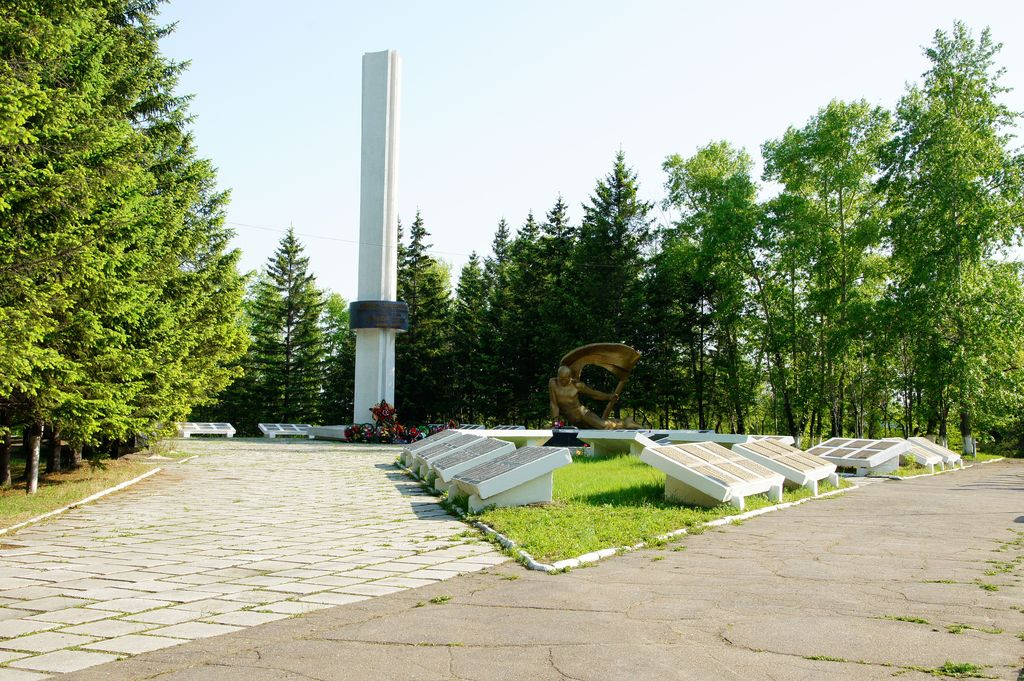 Памятник ВОВ в г. Свободном